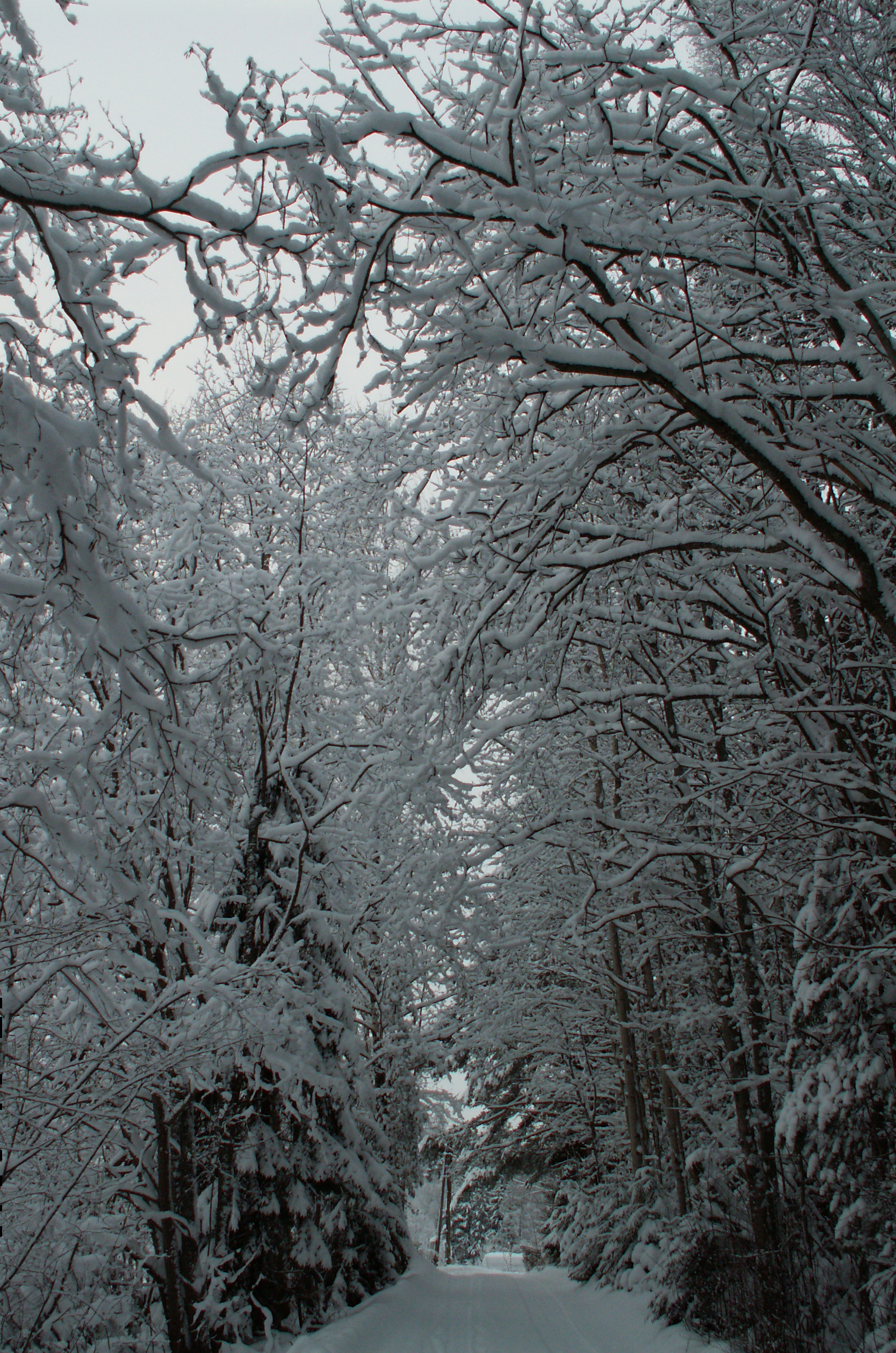 Зима. Финляндия. 2005 г.